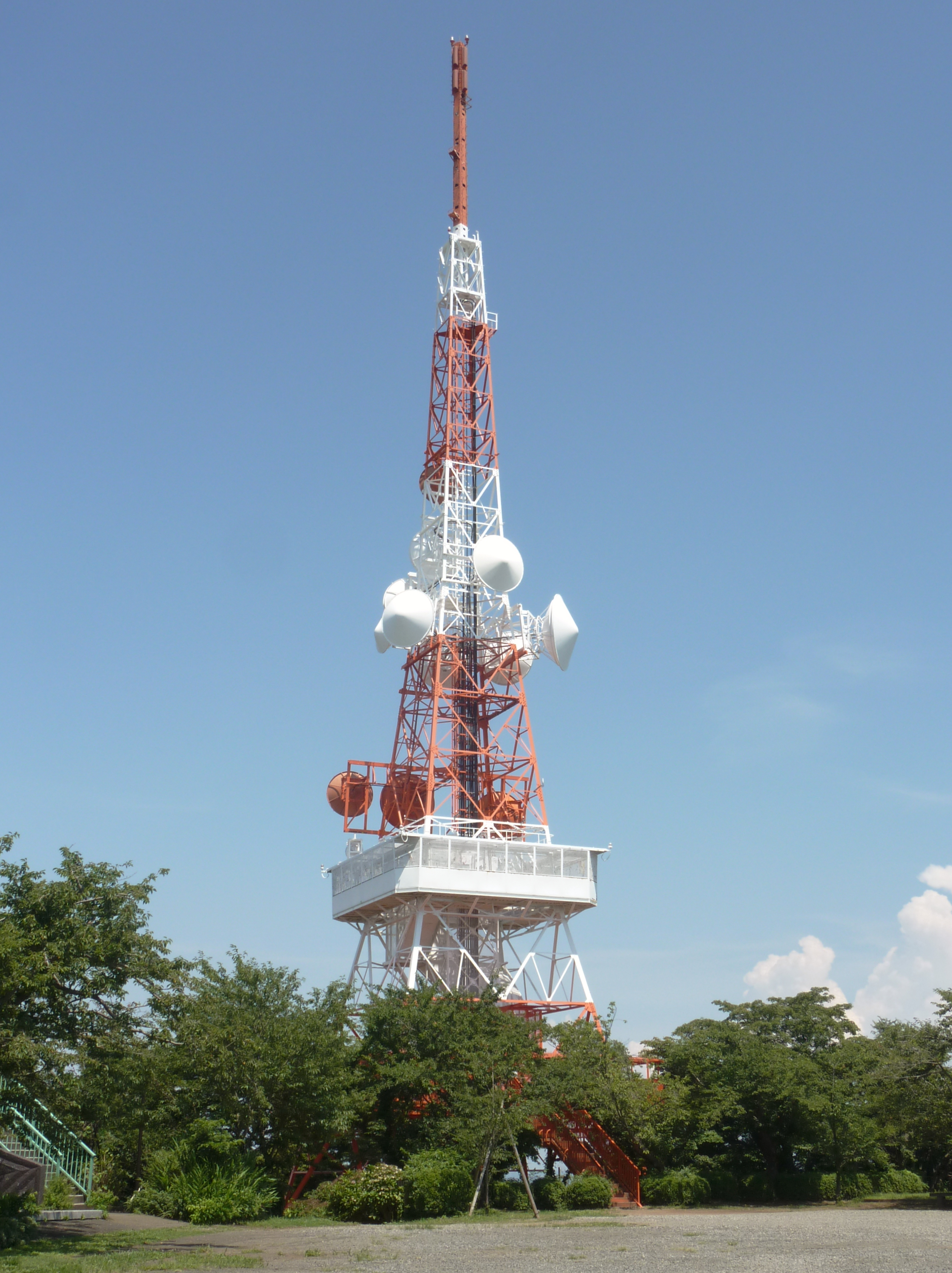 神奈川県平塚市。湘南平の平塚テレビ中継局。